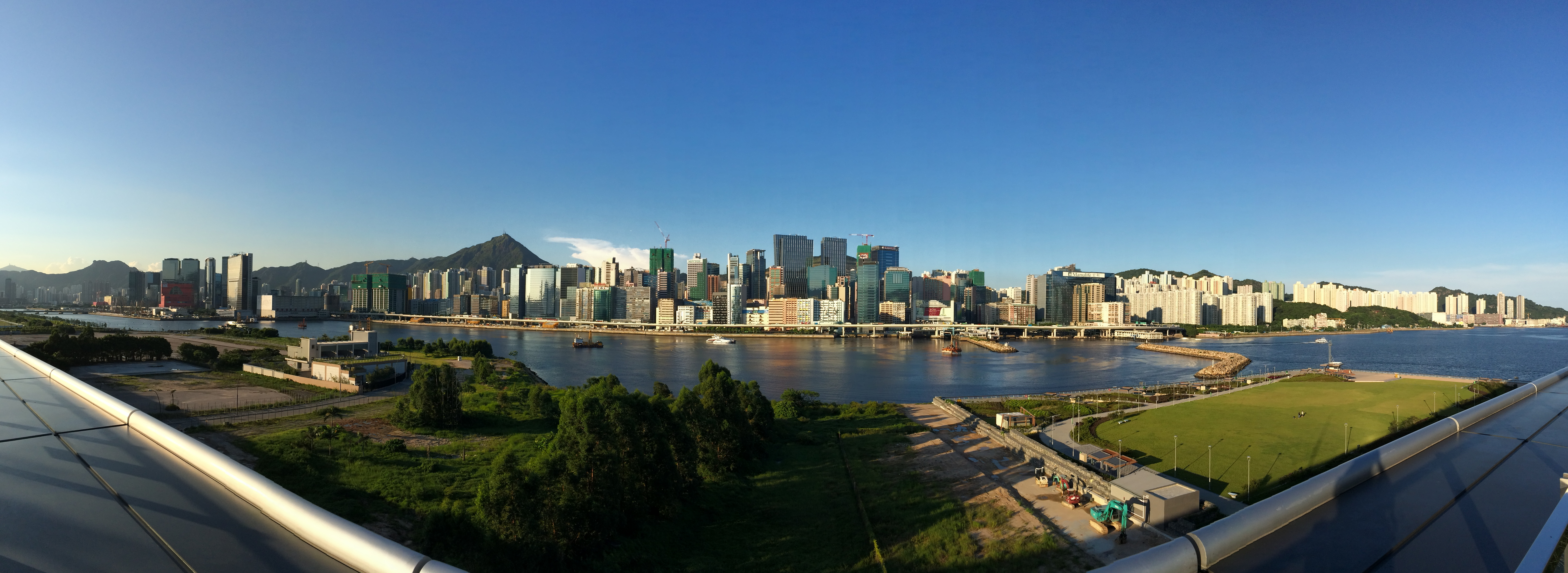 East Kowloon Pano